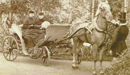 княжна Мария Элимовна Мещерская и Александра Васильевна Жуковская на прогулке в Царскосельском парке